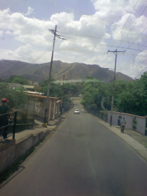 Avenida Los Puentes con el Cerro Pariapan al fondo